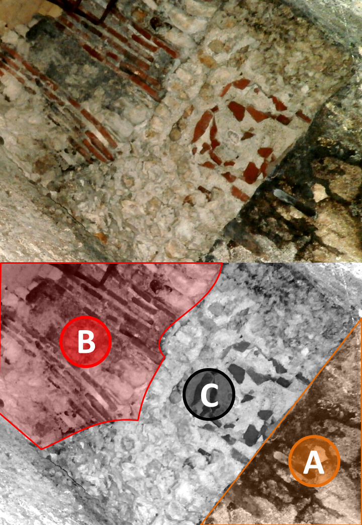 voûte de l'amphithéâtre de Tours ; détail et légendes : (A) 1er siècle ; (B) 2ème siècle ; (C) Moyen-Âge